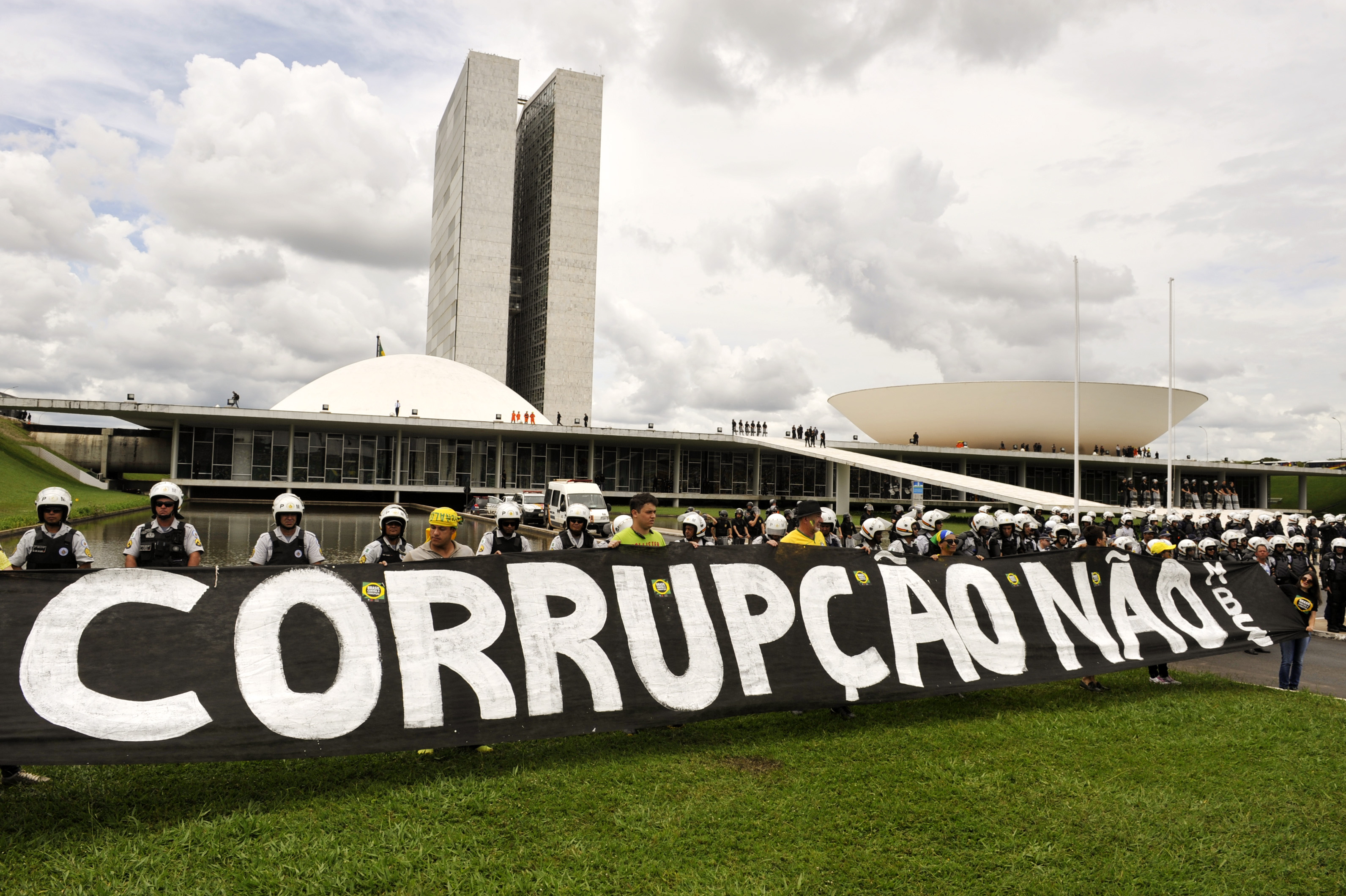 Manifestantes tomam gramado em frente ao Congresso Nacional e protestam pelo fim da corrupção no Brasil. Vestidos com camisetas verdes e amarelas, milhares de manifestantes lotaram de forma pacífica neste domingo (15) a Esplanada dos Ministérios, em Brasília, para protestar contra a presidente Dilma Rousseff e pedir o fim da corrupção no país. Segundo o Departamento Operacional da Polícia Militar do Distrito Federal, ao menos 45 mil pessoas atenderam às convocações feitas nas redes sociais para o protesto contra o governo. Um dos organizadores do movimento Vem Pra Rua, calculou em pelo menos 80 mil o número de pessoas que participaram da manifestação na capital federal. Foto: Jonas Pereira/Agência Senado